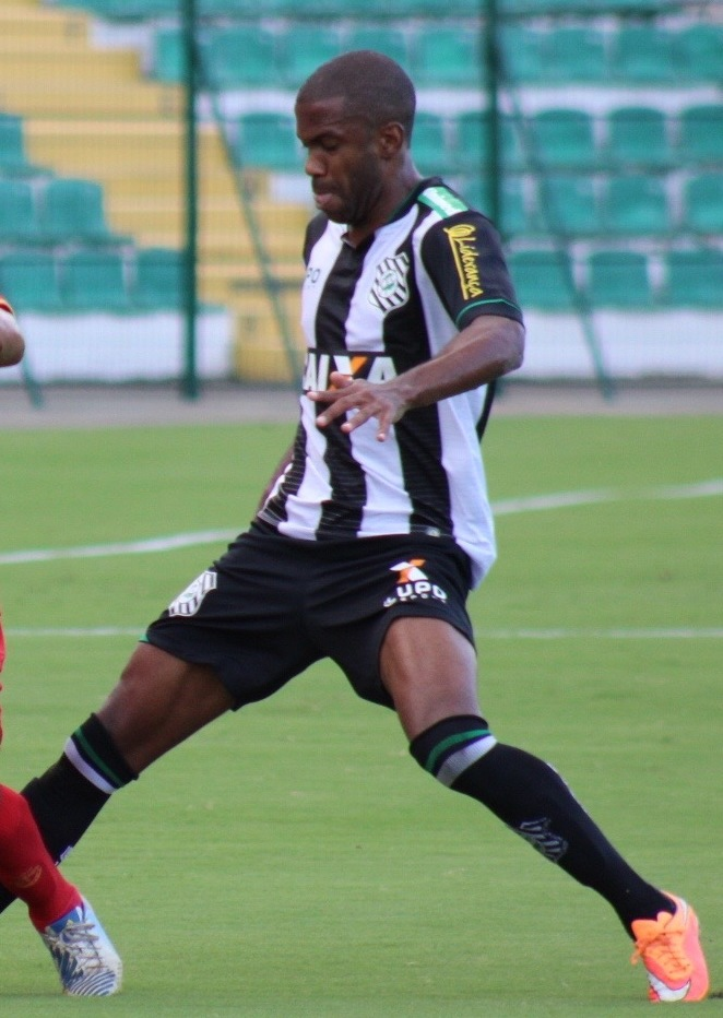 Fabinho (direita) em jogo do Figueirense de 2015 contra o Inter de Lages